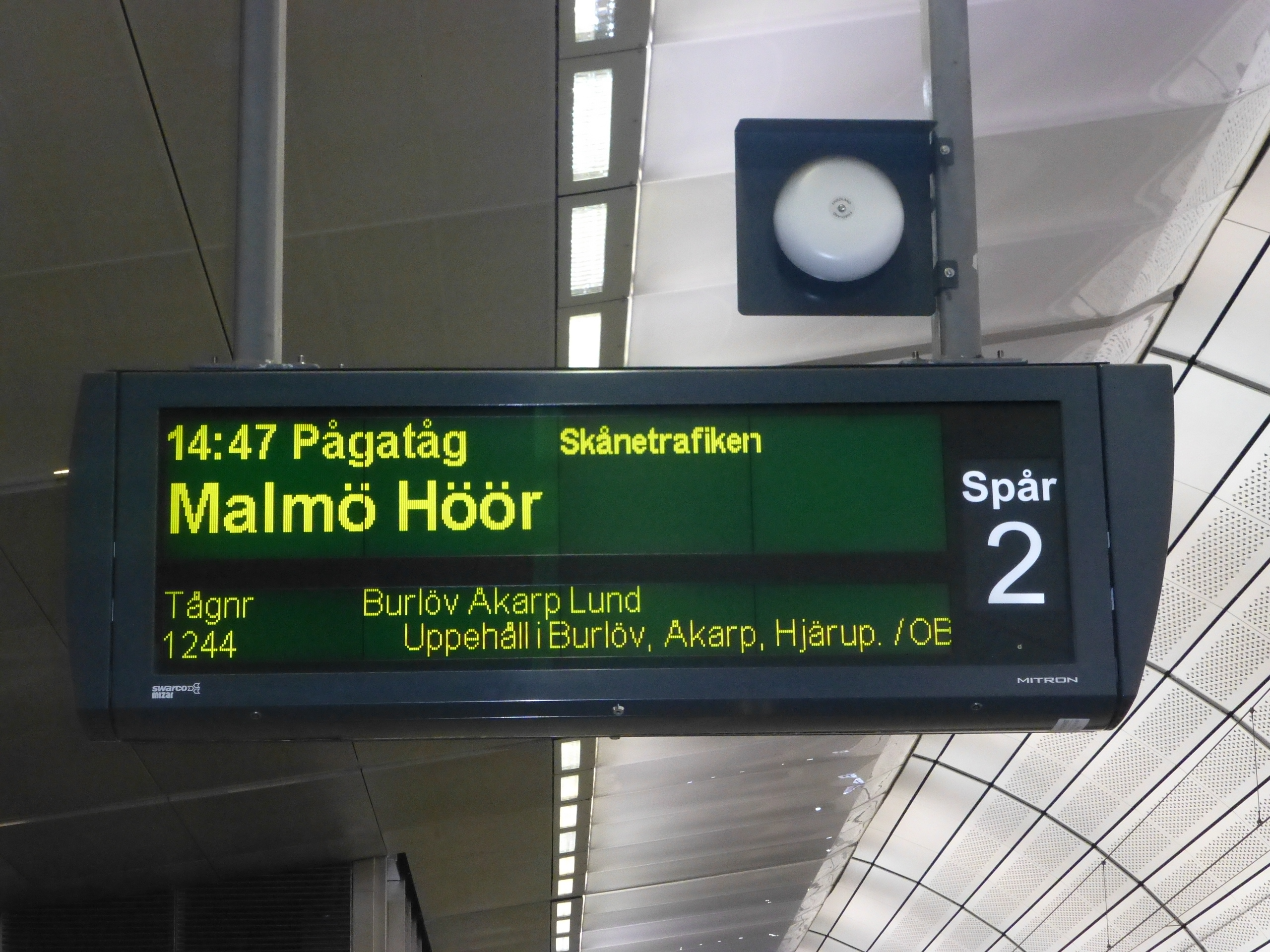 Information board at Triangeln Station, Sweden. Pågatåg for Höör.